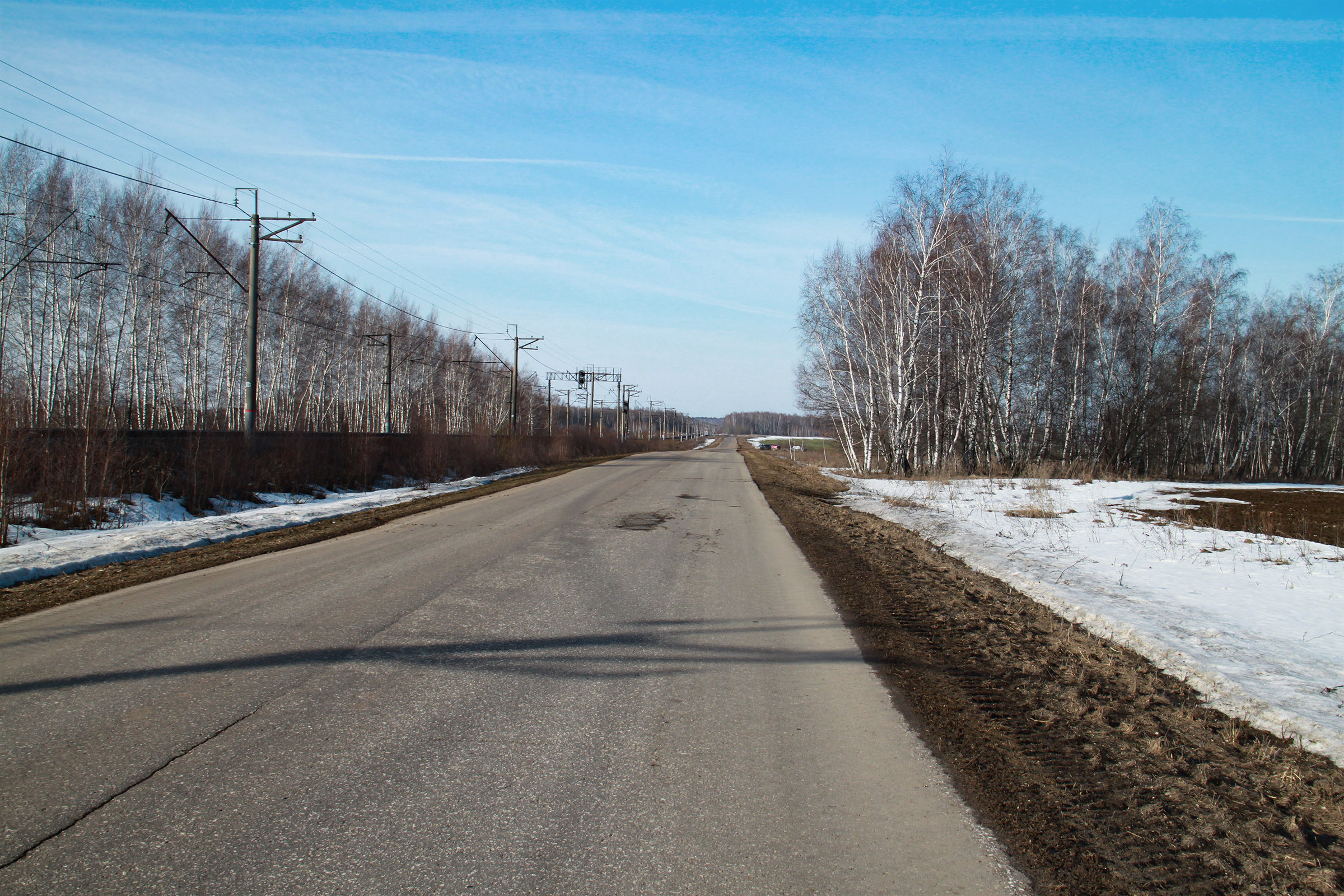 Автодорога 61Н-412 Высокое-Житово-Ильинское